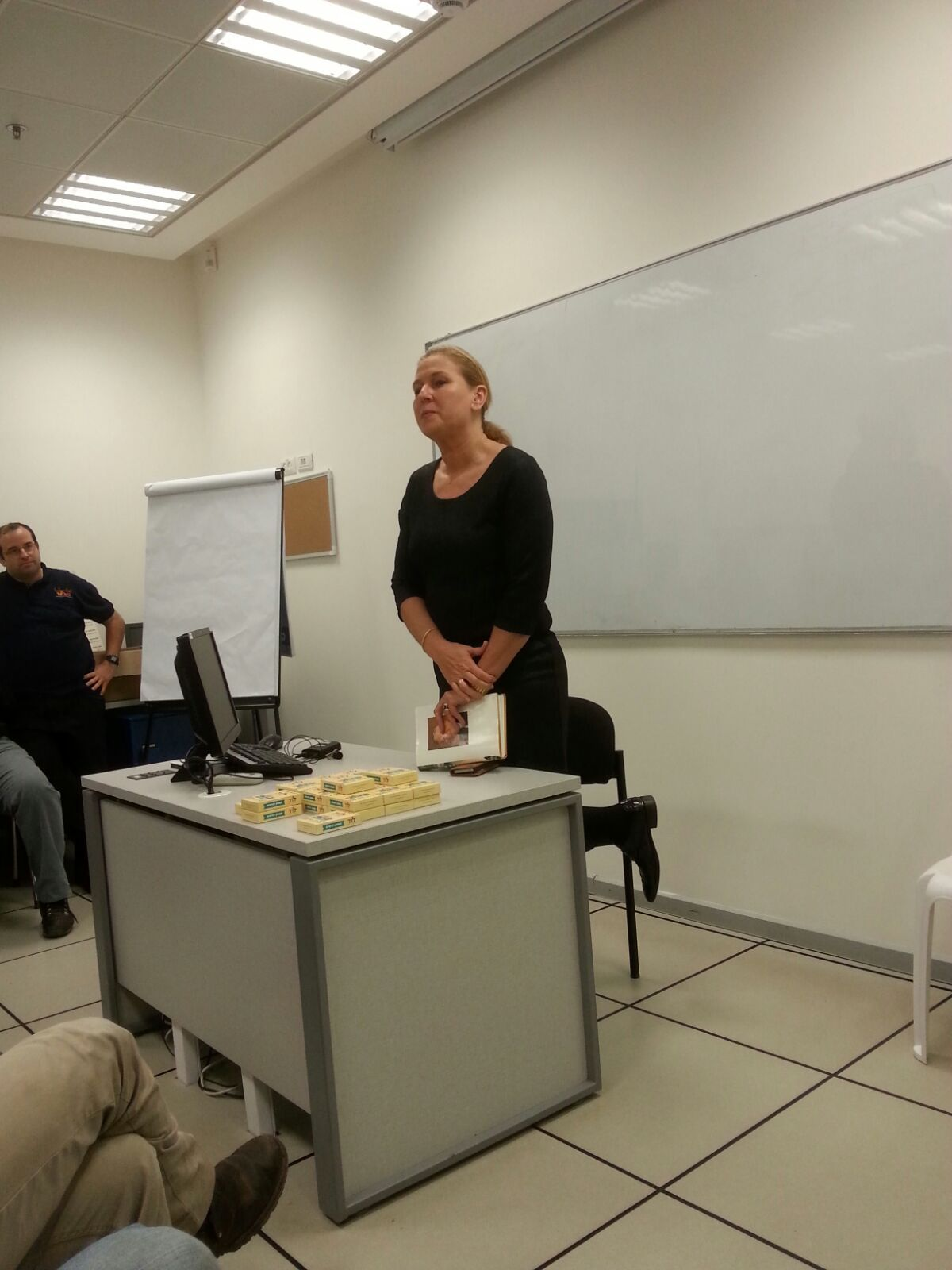 ציפי לבני בהרצאה על אביה, איתן לבני